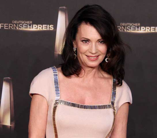 Iris Berben beim Deutschen Fernsehpreis 2012